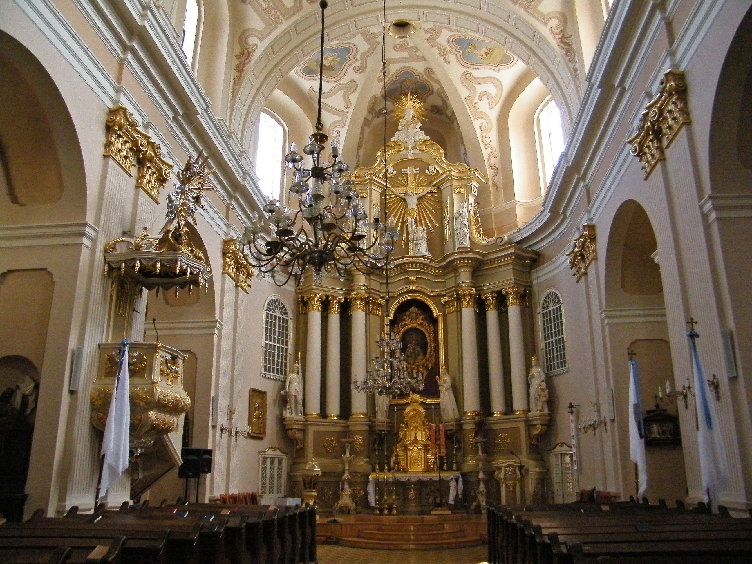 Złoczów - pierwotnie kościół Pijarów z 1730, obecnie rzymskokatolicki kościół parafialny pw. Wniebowzięcia Najświętszej Maryi Panny